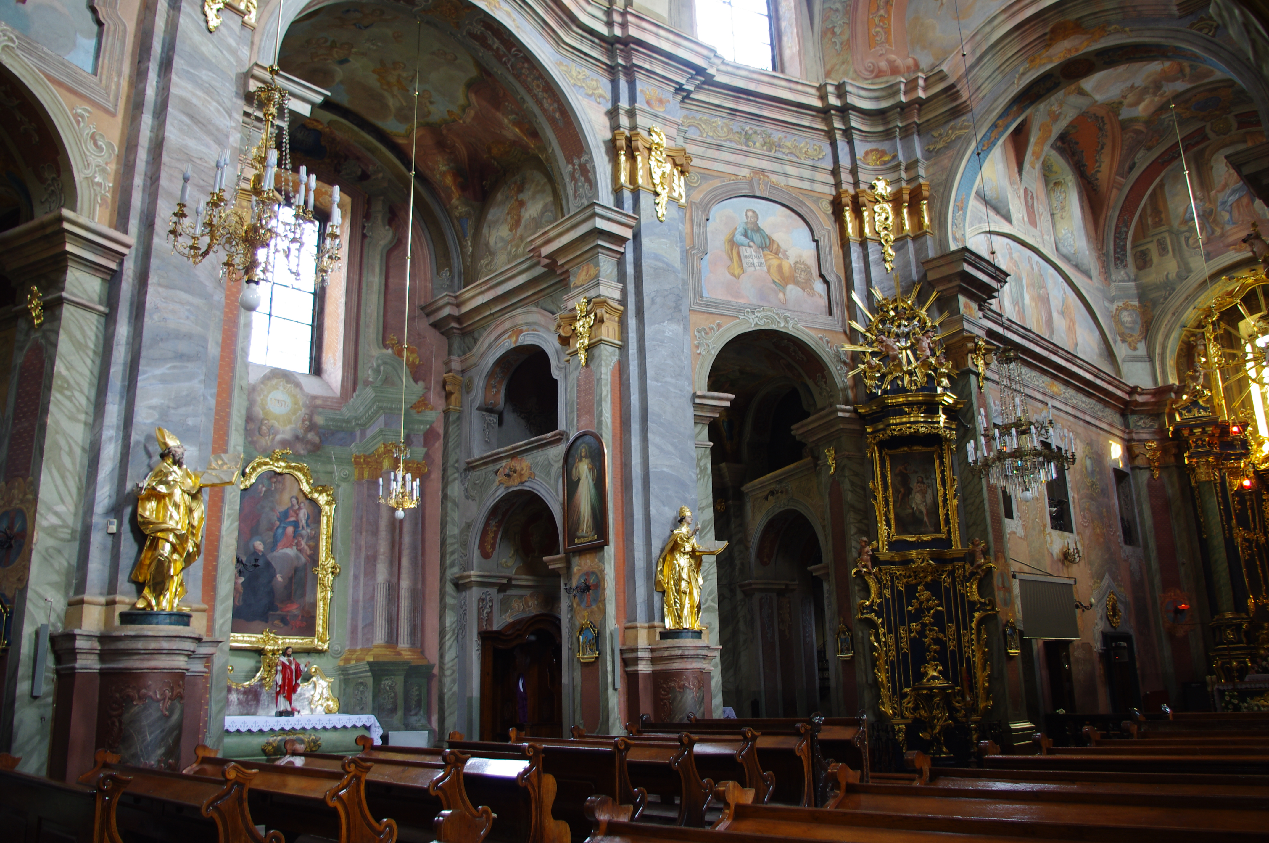 Tak piękne malarstwo trzeba fotografować i rozpowszechniać.Kościół i klasztor w Chełmie.Przyjeżdżajcie,tuż obok jest wejście do podziemi kredowych-godzinny marsz pod ulicami starego miasta!!!!